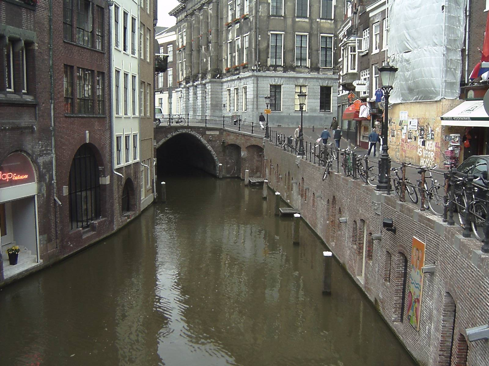 Oudegracht in Utrecht